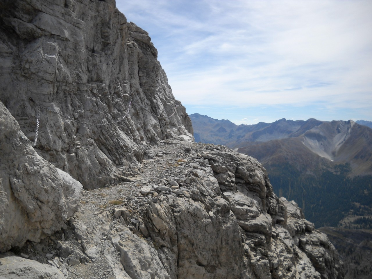 Tratto attrezzato della quarta tappa del sentiero Roberto Cavallero, tra il monte Scaletta ed il passo Peroni.